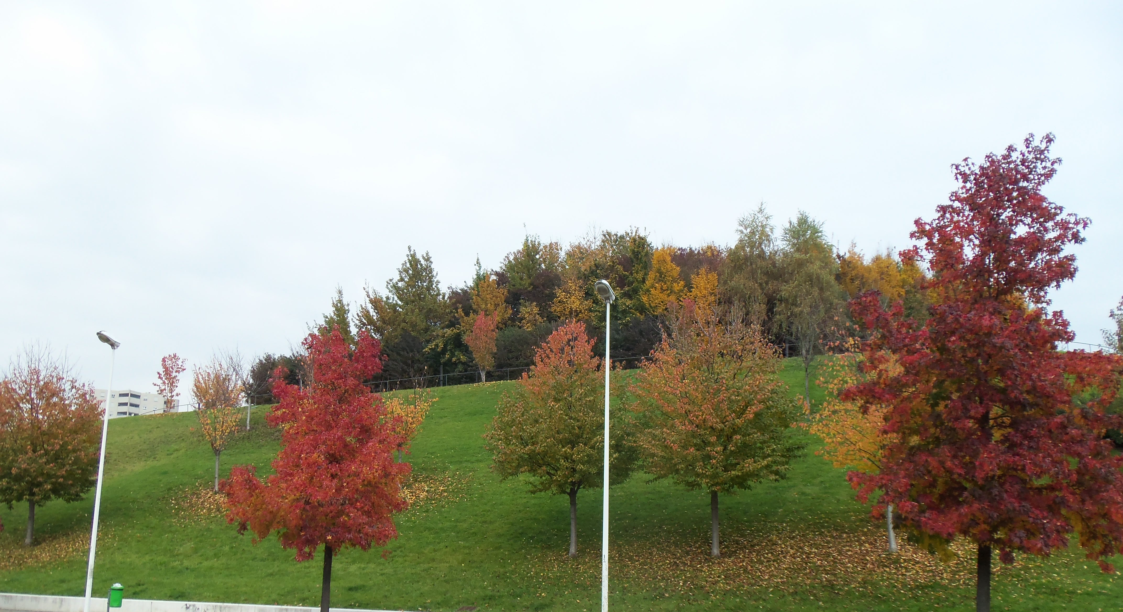 Milano, parco Collina dei Ciliegi